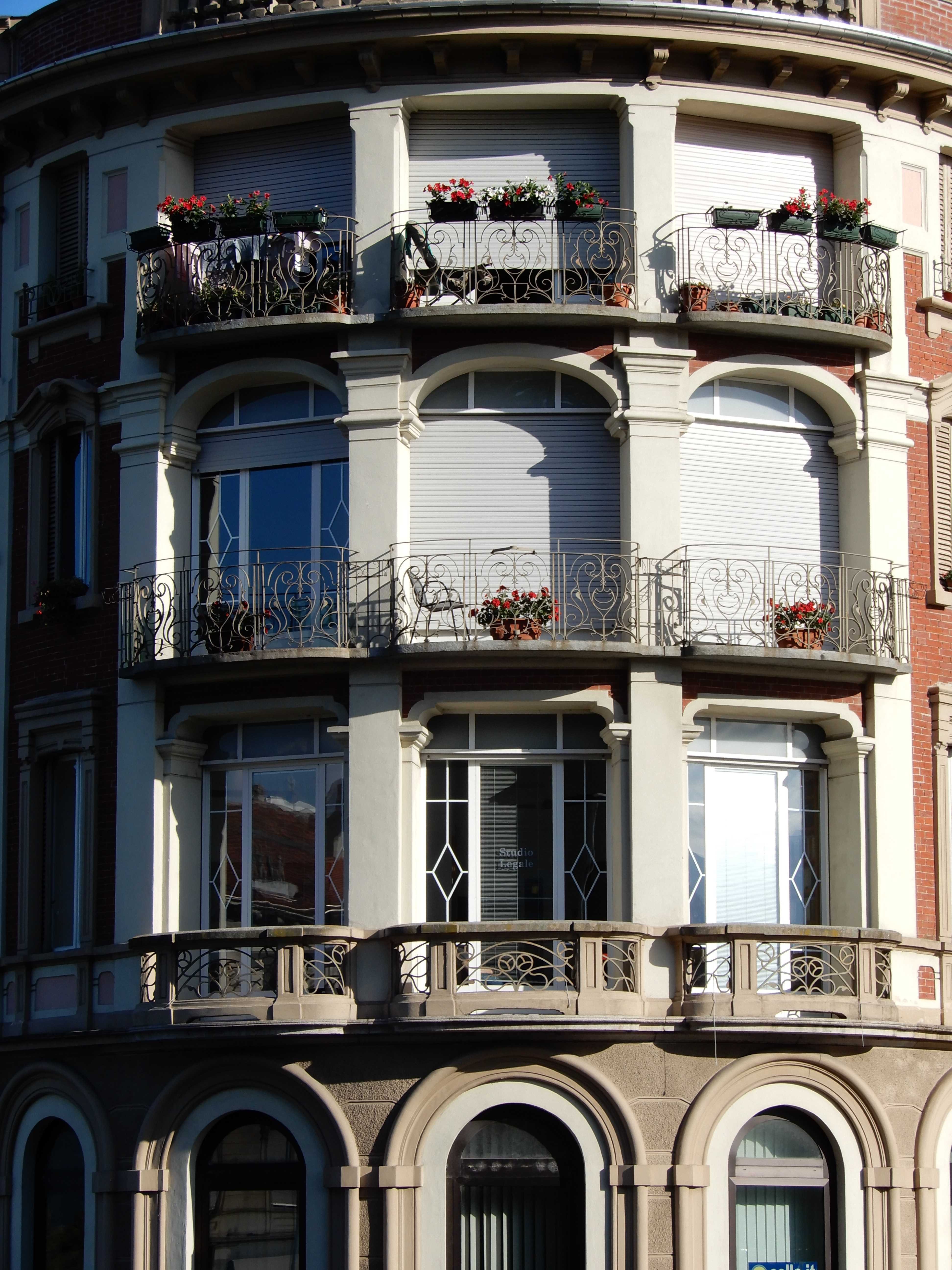 Palazzo Ravera: facciata